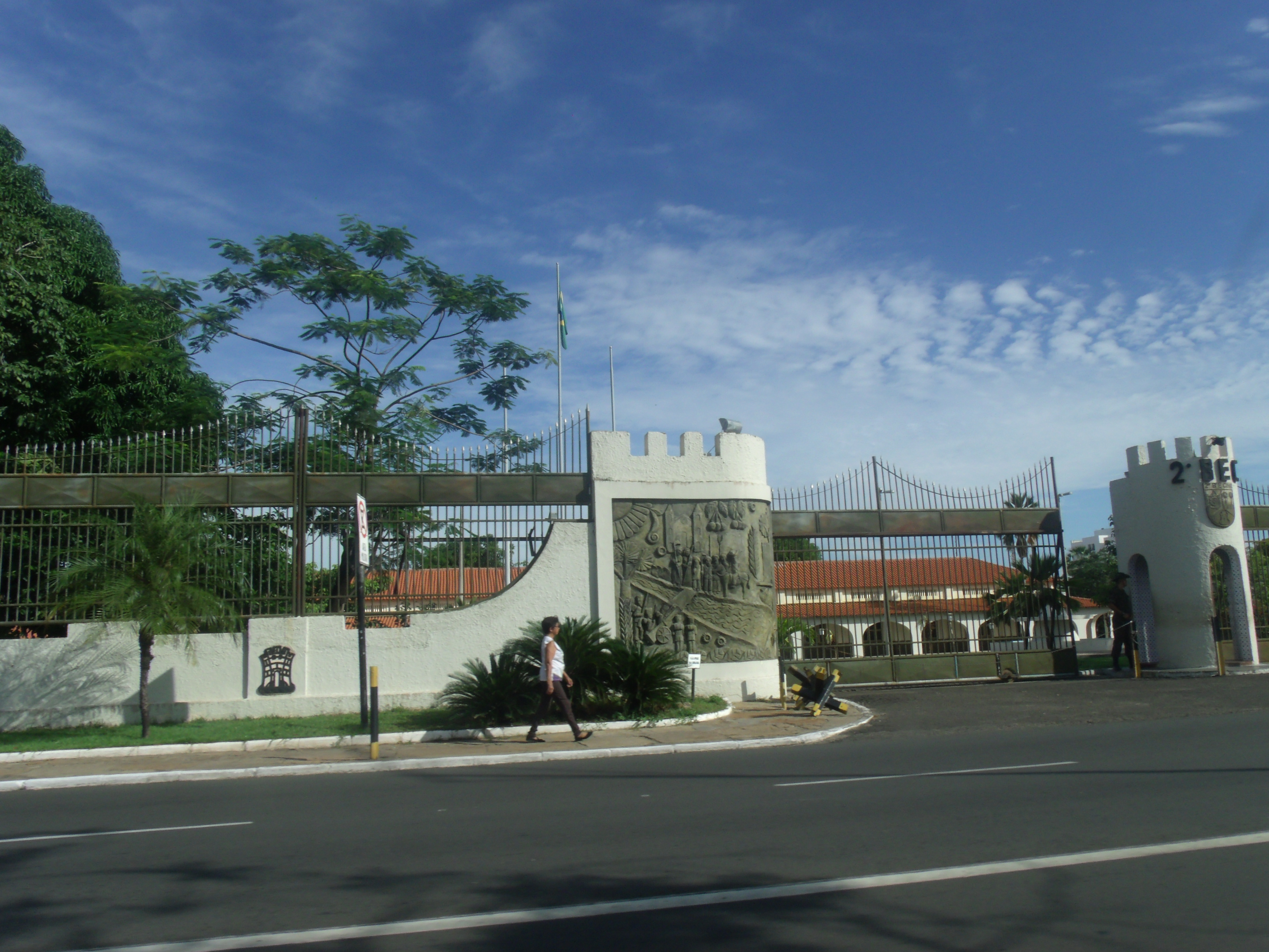 Entrada do 2º Batalhão de Engenharia de Construção, em Teresina.